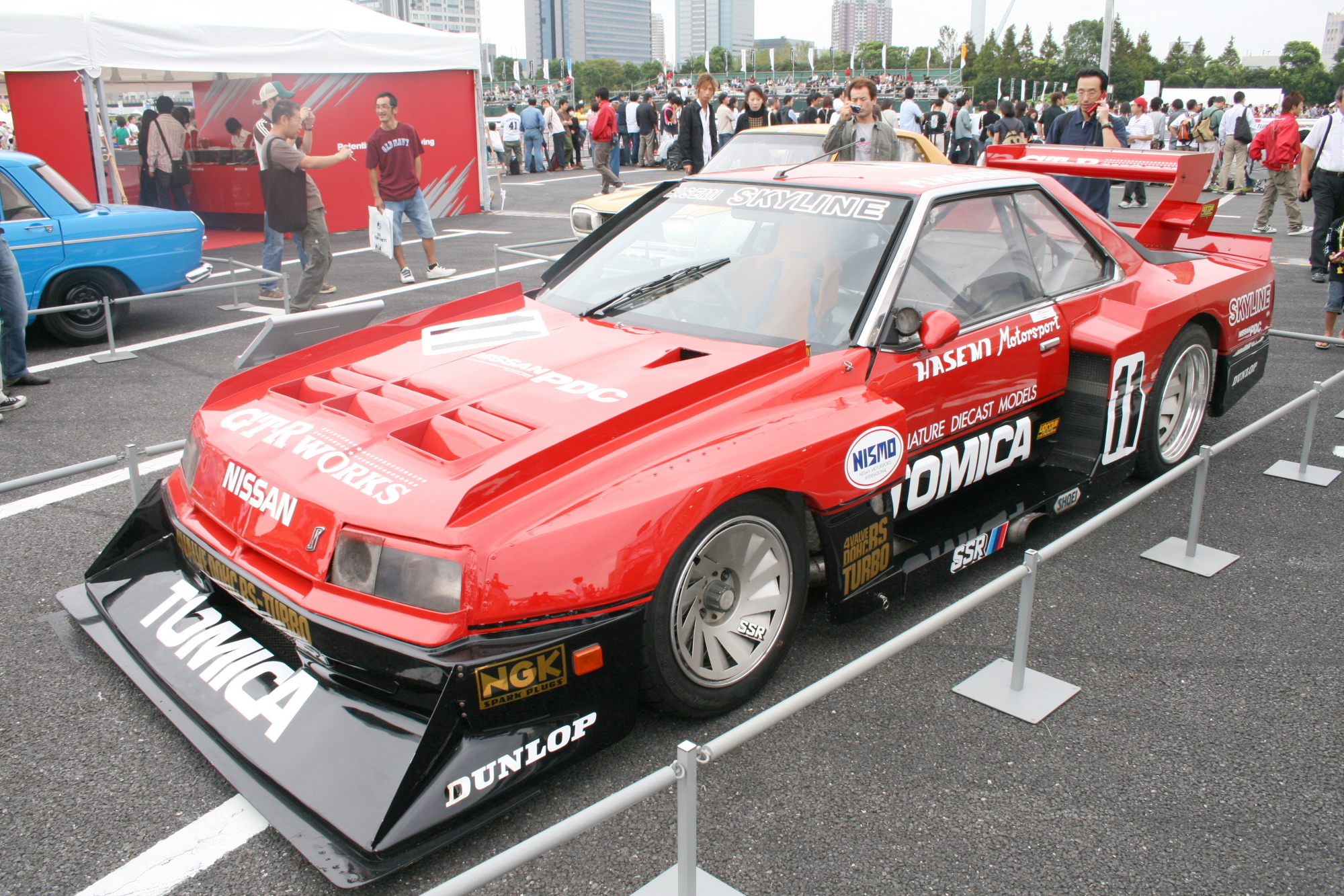 Tomica Skyline